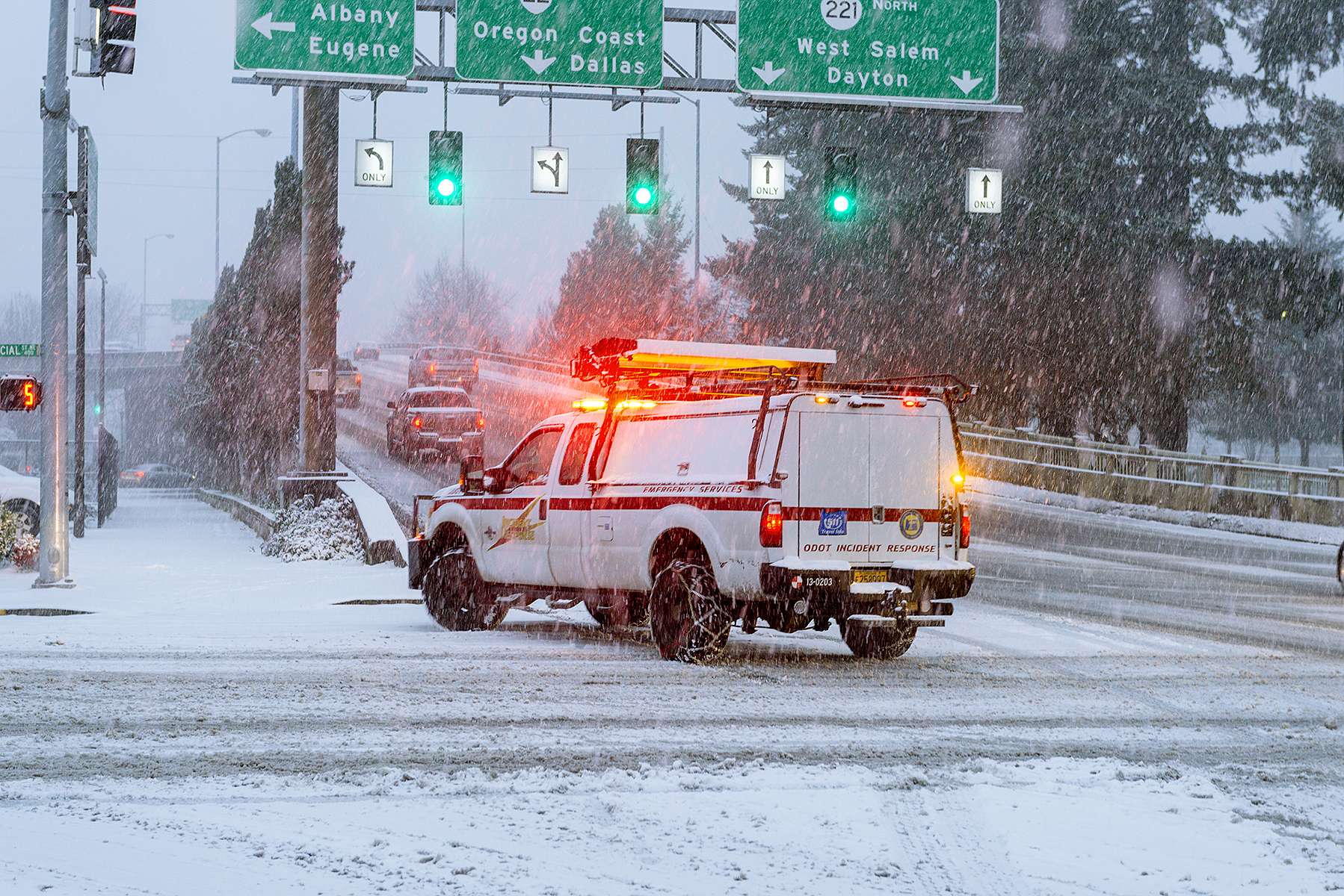 Incident response truck